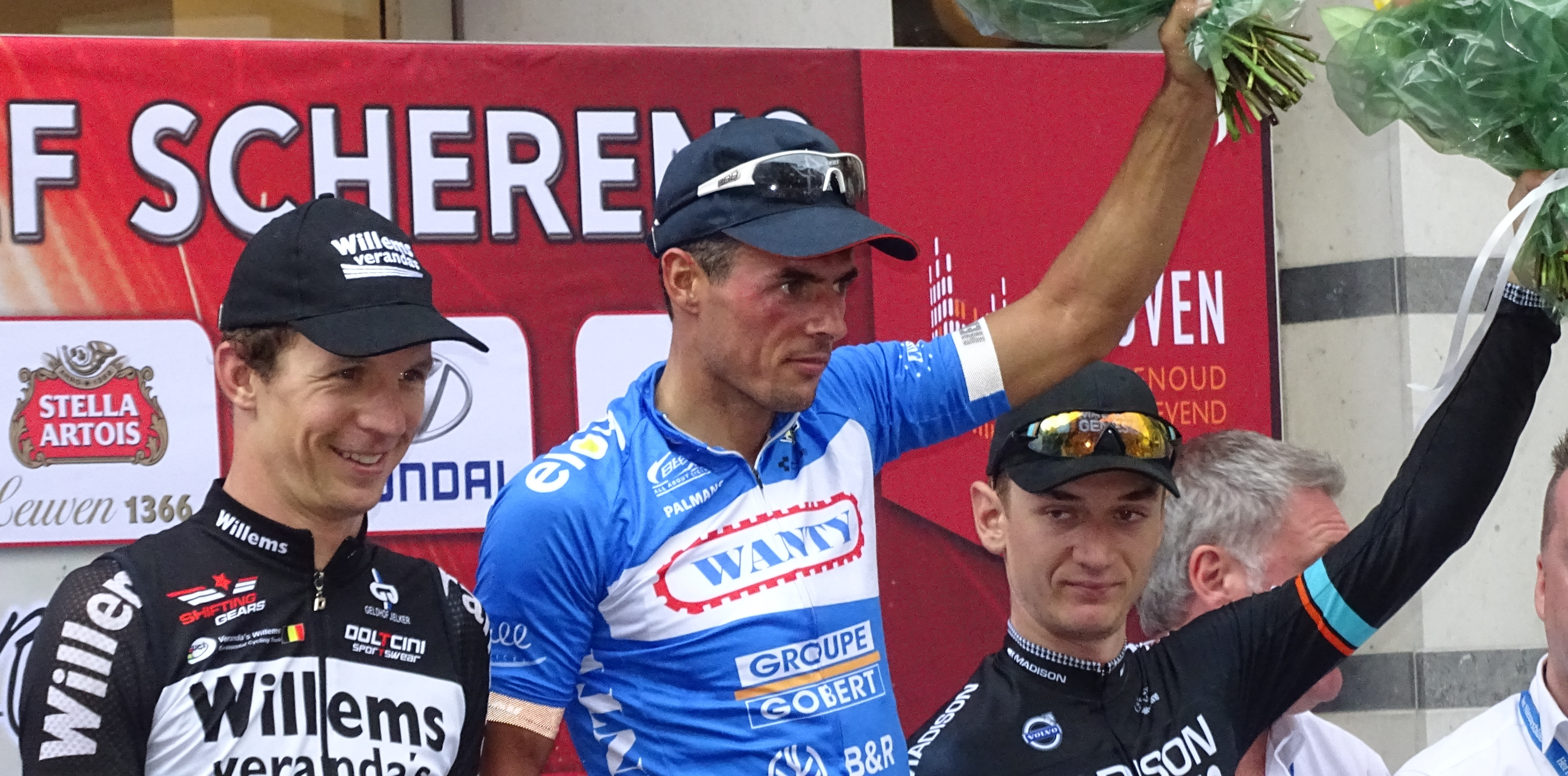 Reportage réalisé le dimanche 23 août à l'occasion du départ et de l'arrivée du Grand Prix Jef Scherens 2015 à Louvain, Belgique.